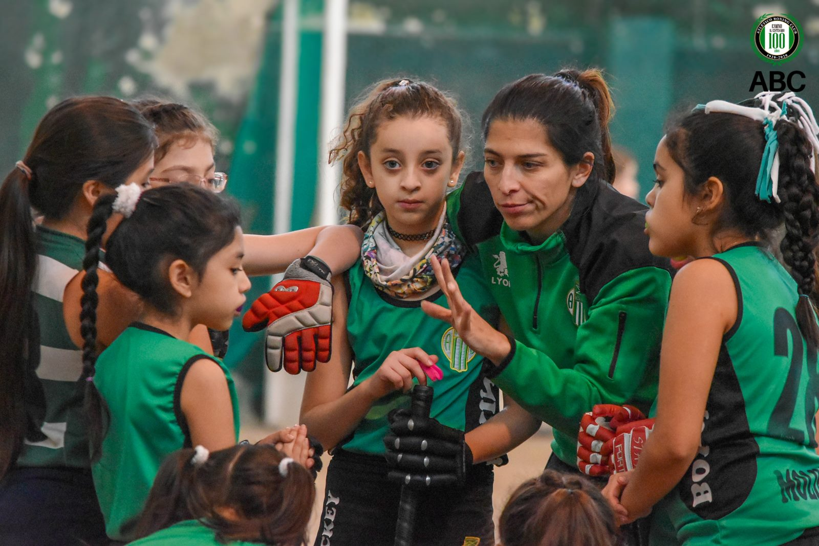 ABC HOCKEY NADIA SADDE